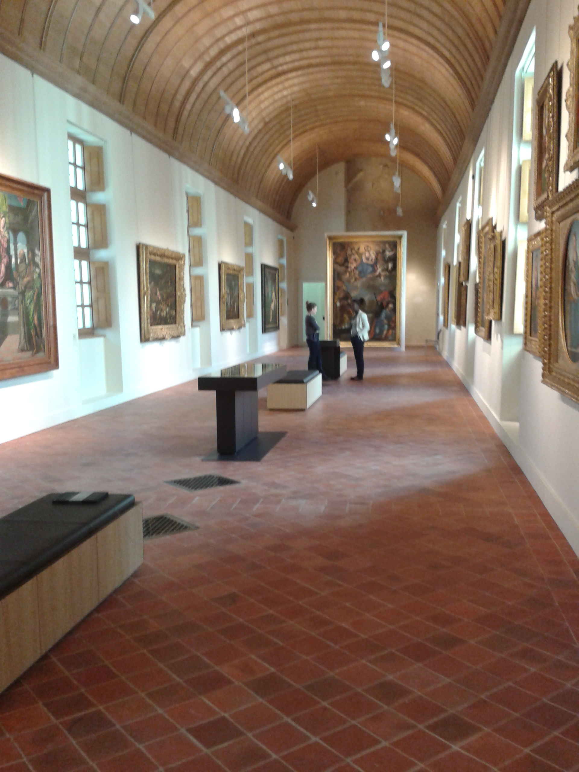 La galerie Bellegarde